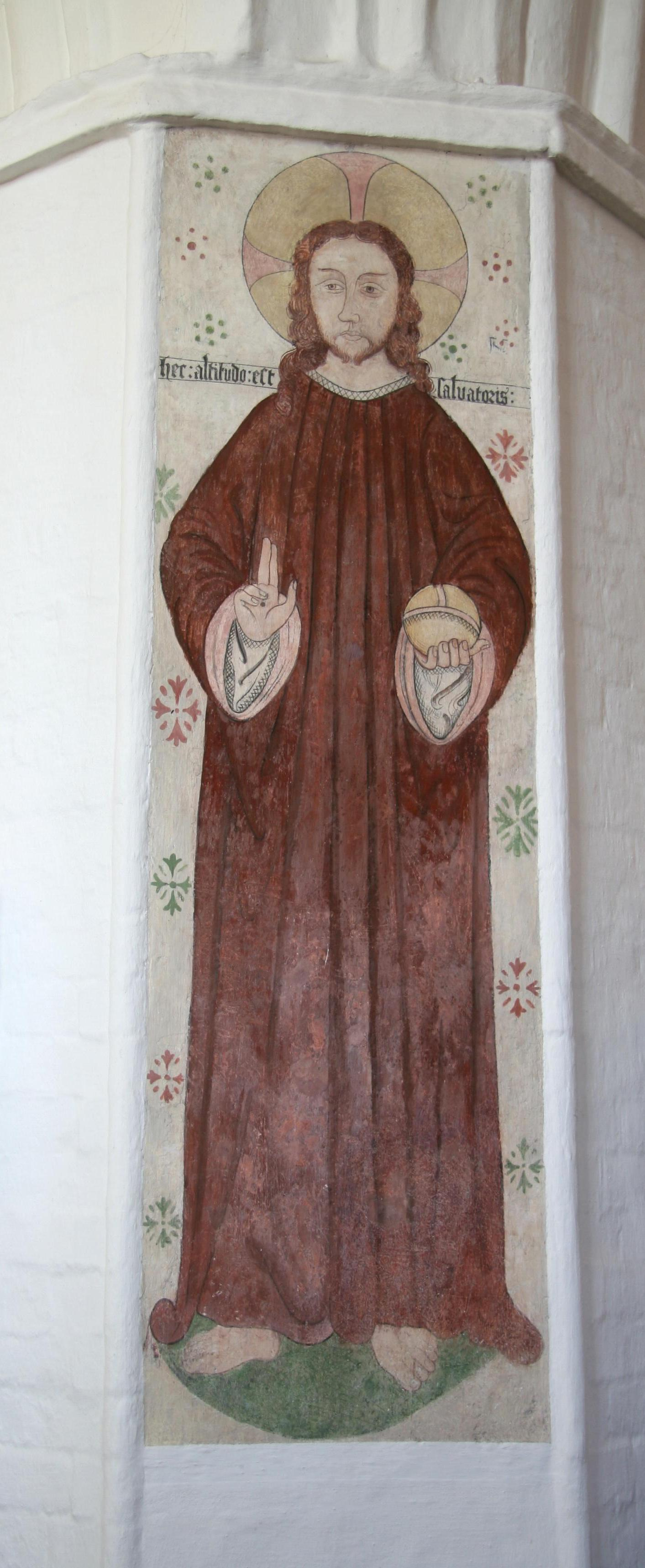 Sankt Nicolai Kirke, Køge, Denmark (Køge Kirke). Fresco painting of the Savior.